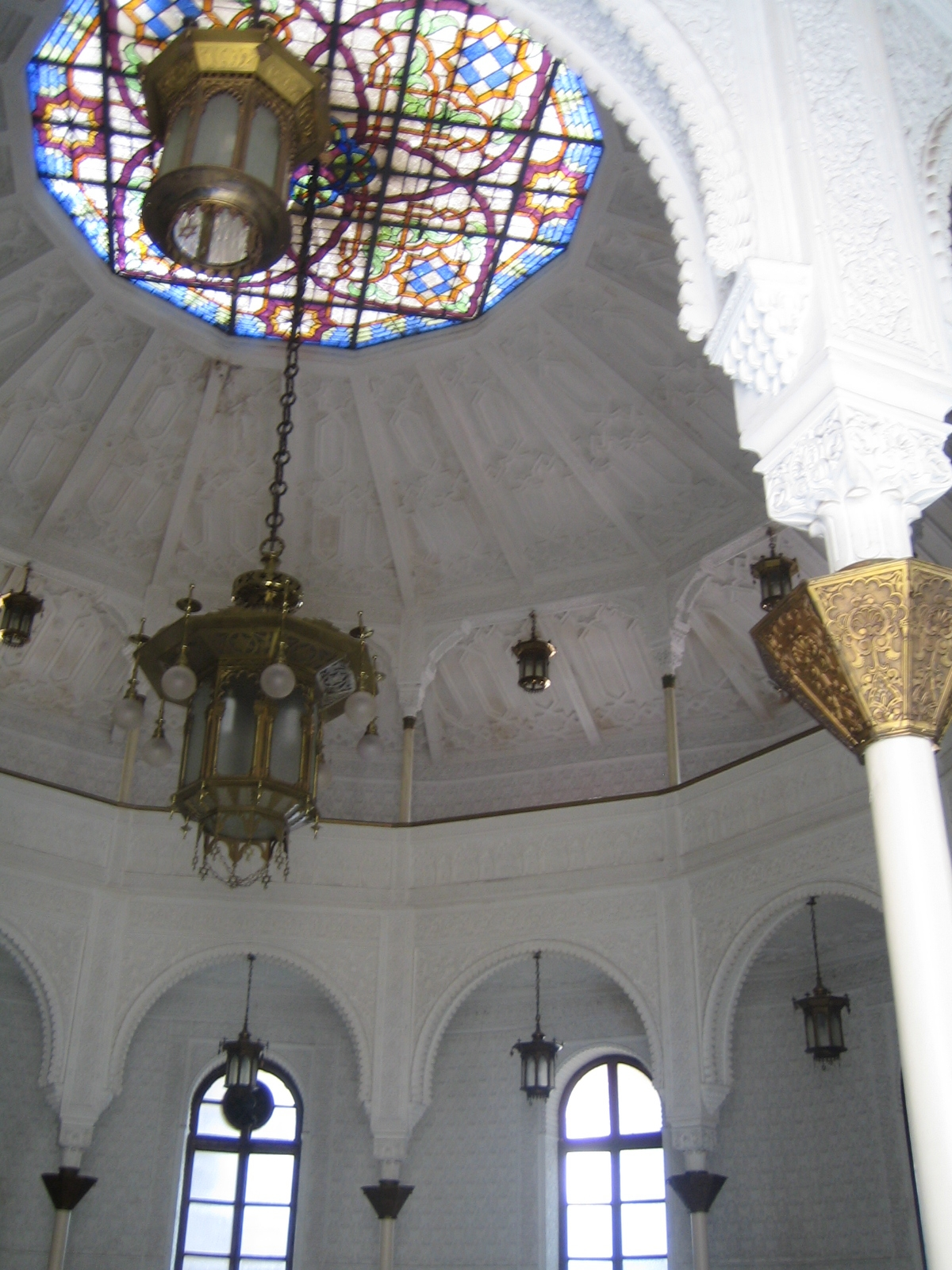 Salón Arabe del Círculo Alzireño. Alzira